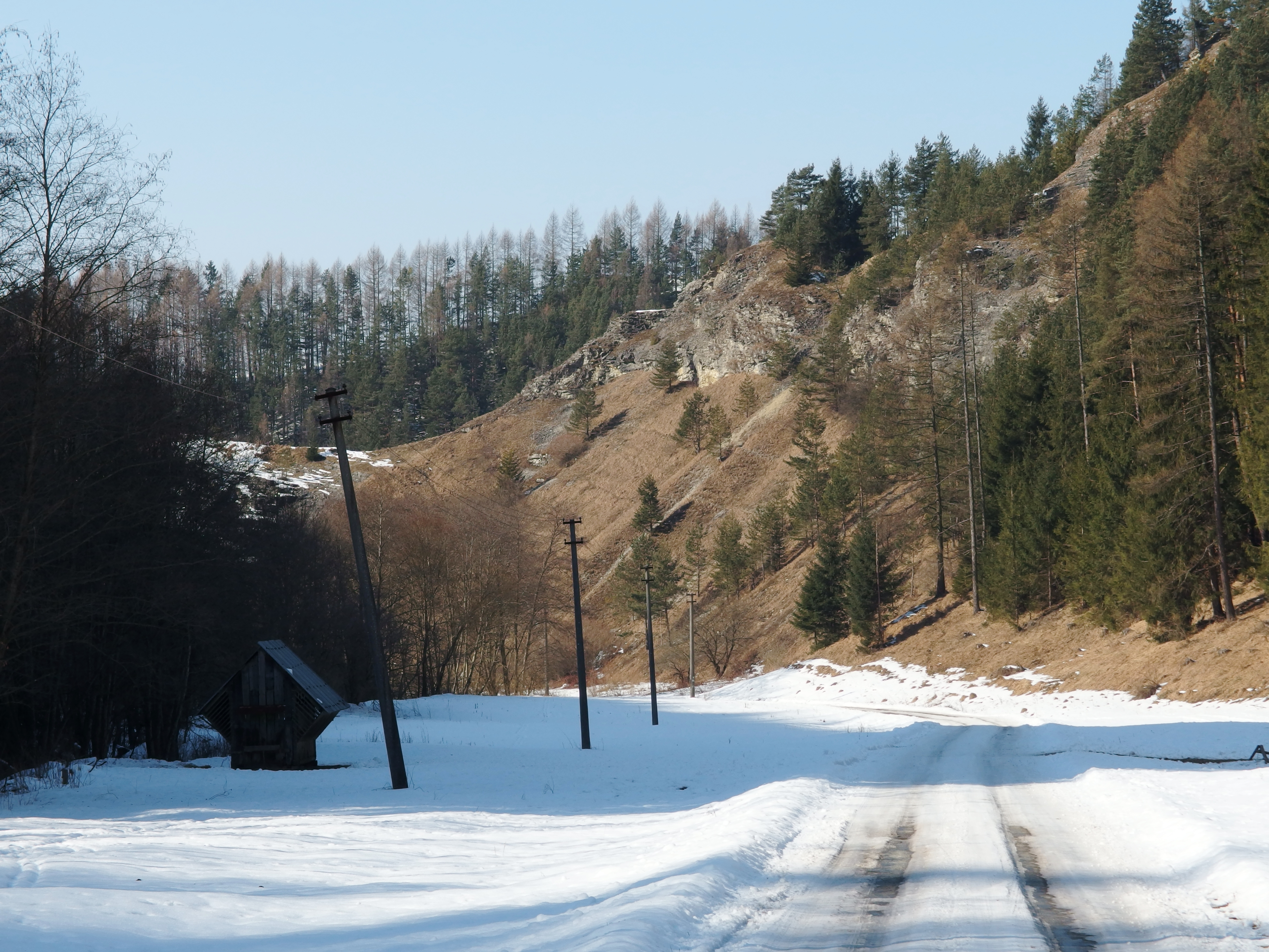 Belianská dolina